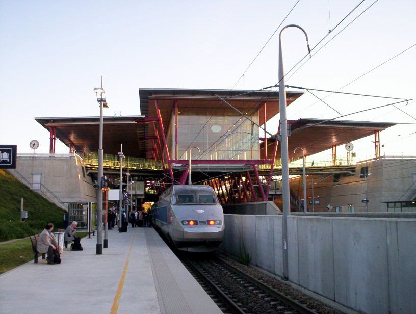 Vue du quai des TGV (Direction Paris)